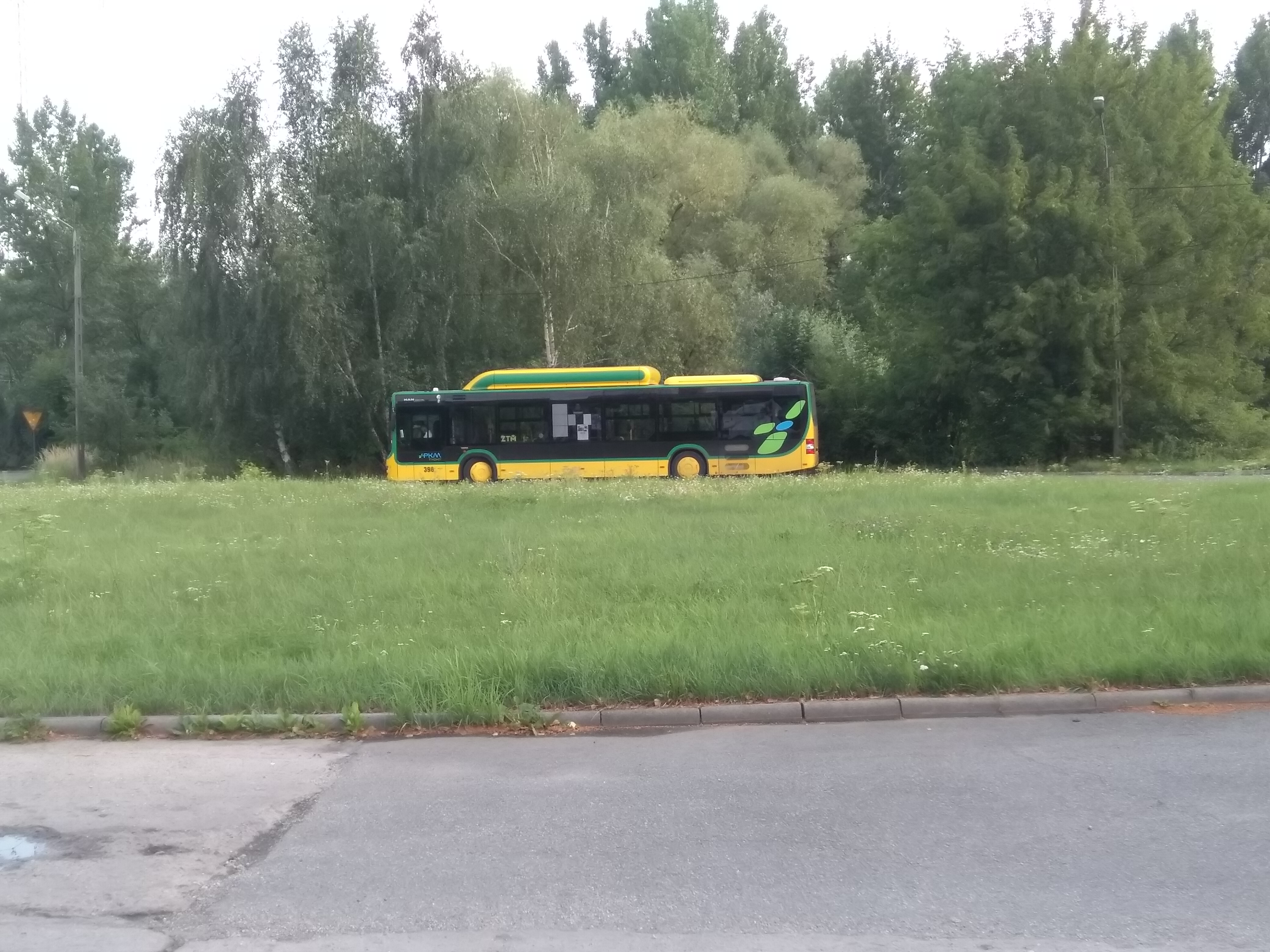 Autobus ten Ma przerwe na przystanku Łaziska Górne Kopanina (Linia 525)